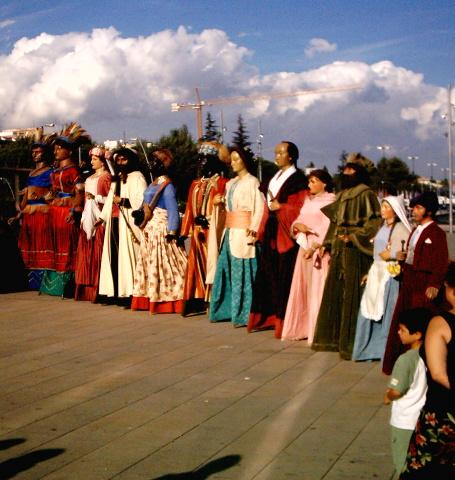 Gegants de Reus